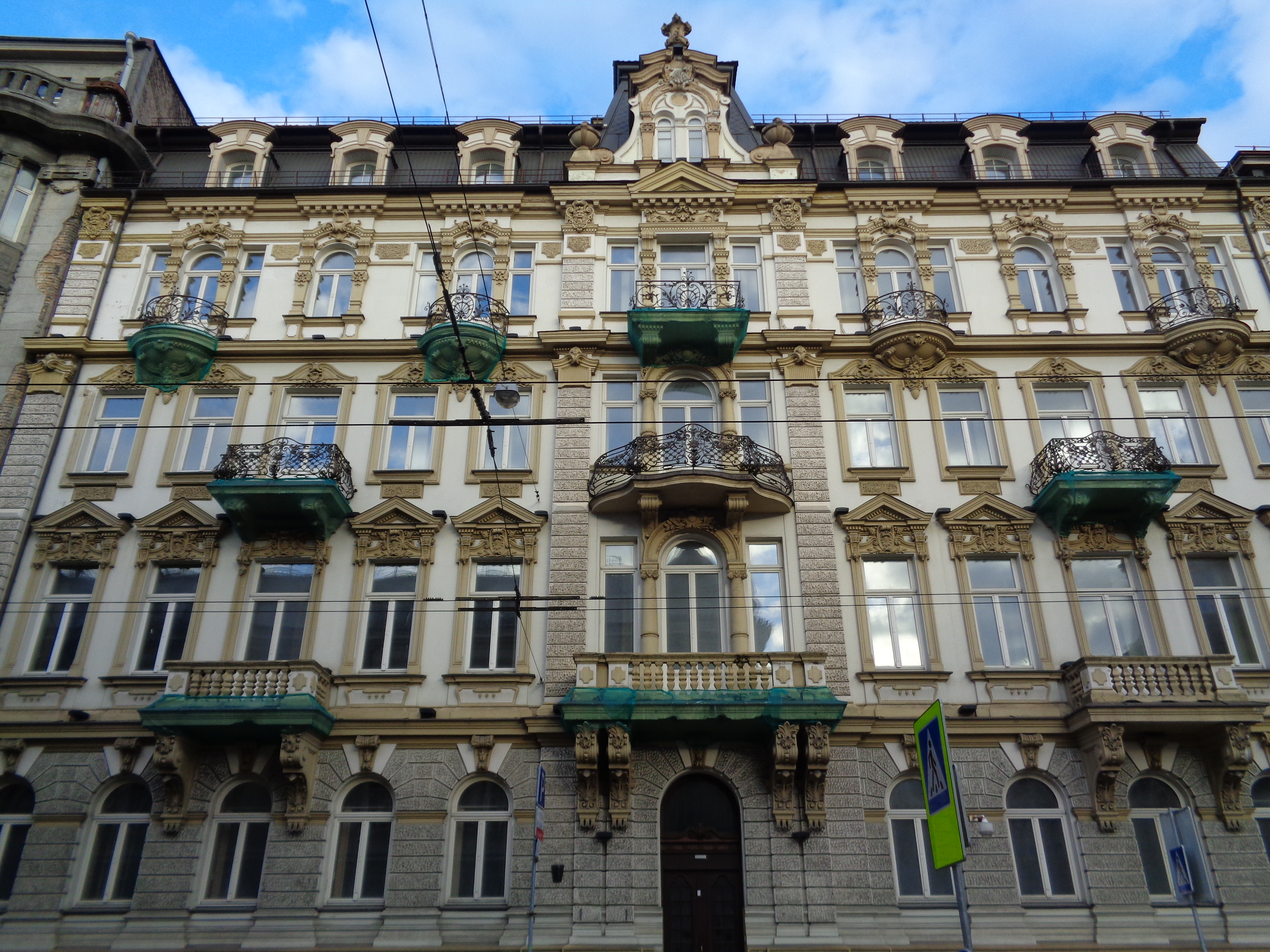 Необарочный дом графини Ядвиги Чапской. Проект Владислава Стипулковского (1899)